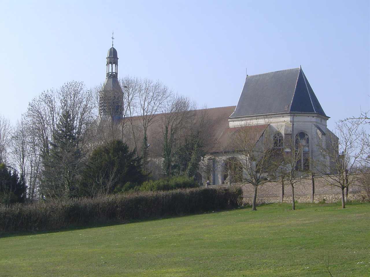 Saint-Mards-en-Othe - L'église